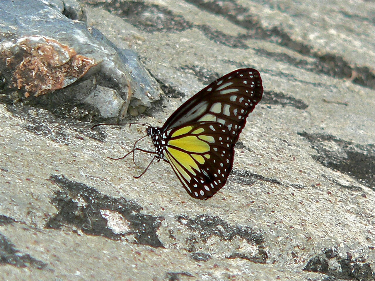 Khao Yai NP, THAILAND